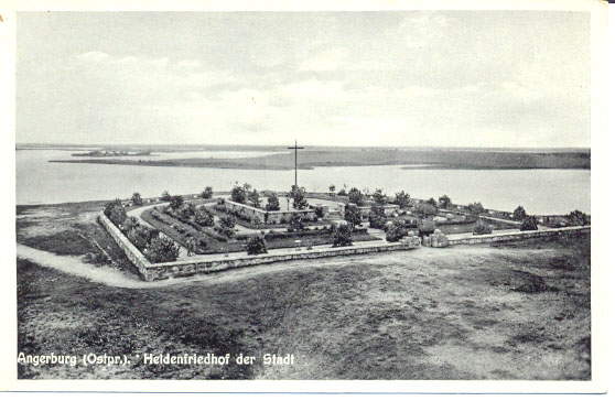 Heldenfriedhof der Stadt Angerburg in Ostpreussen